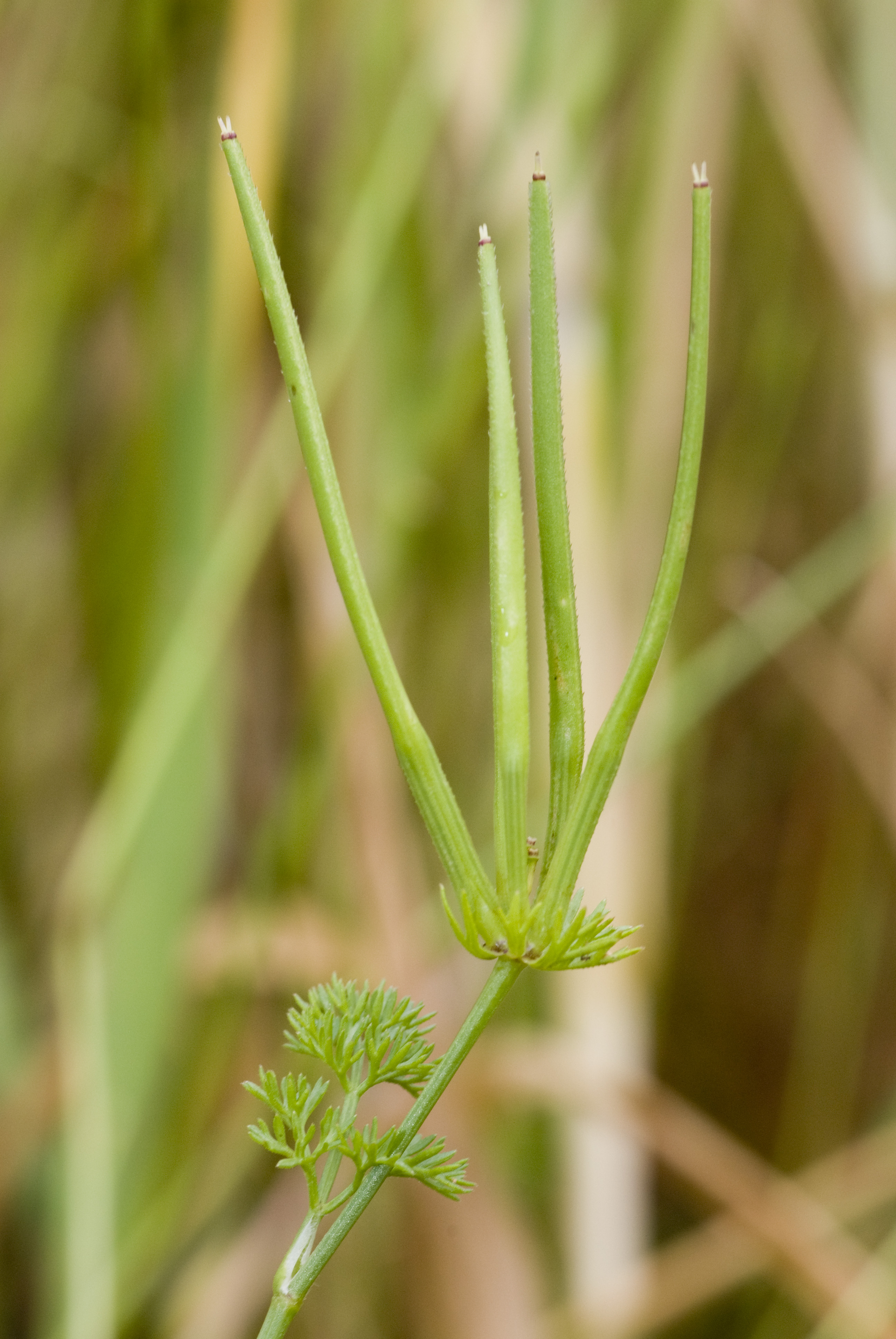 Scandix pecten-veneris Velennes (Somme), France